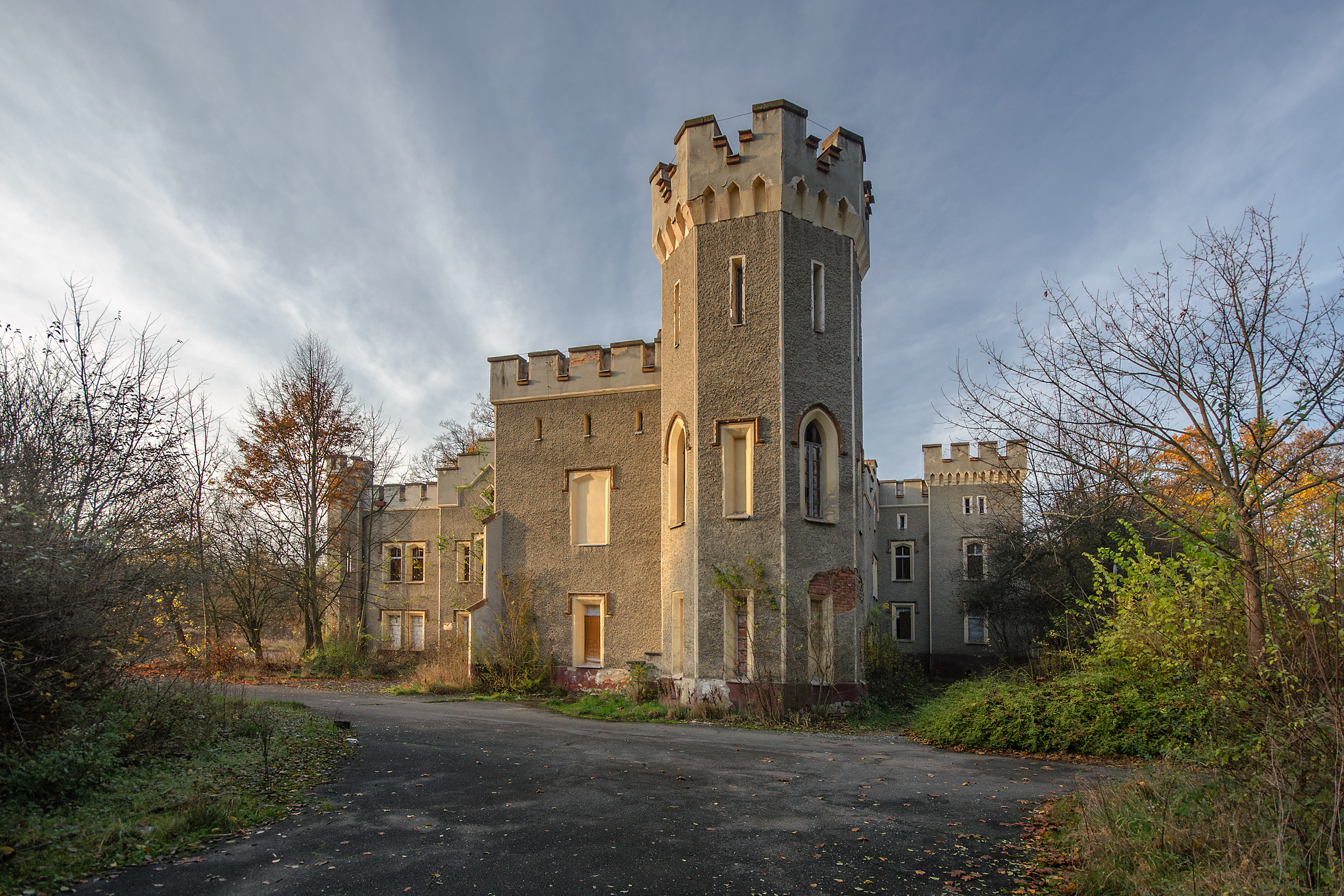 Szczodre, pałac (nr 42), 1851-1867